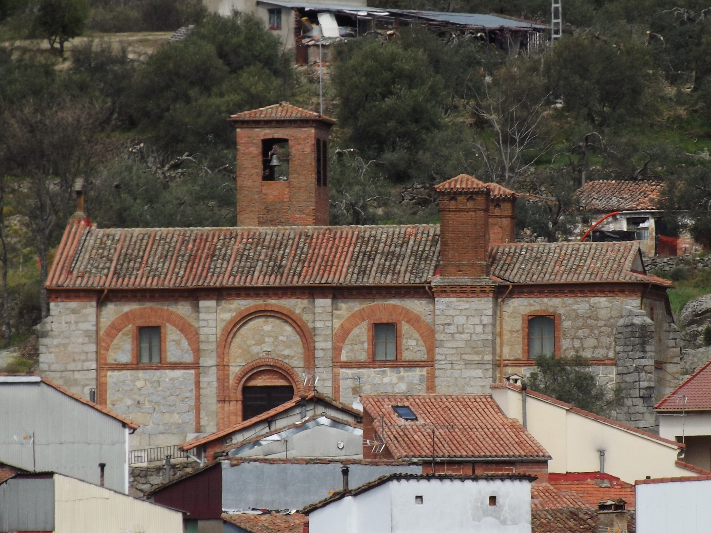 Vista de la iglesia parroquial de San Pedro ad Vincula en La Parra, Ávila.